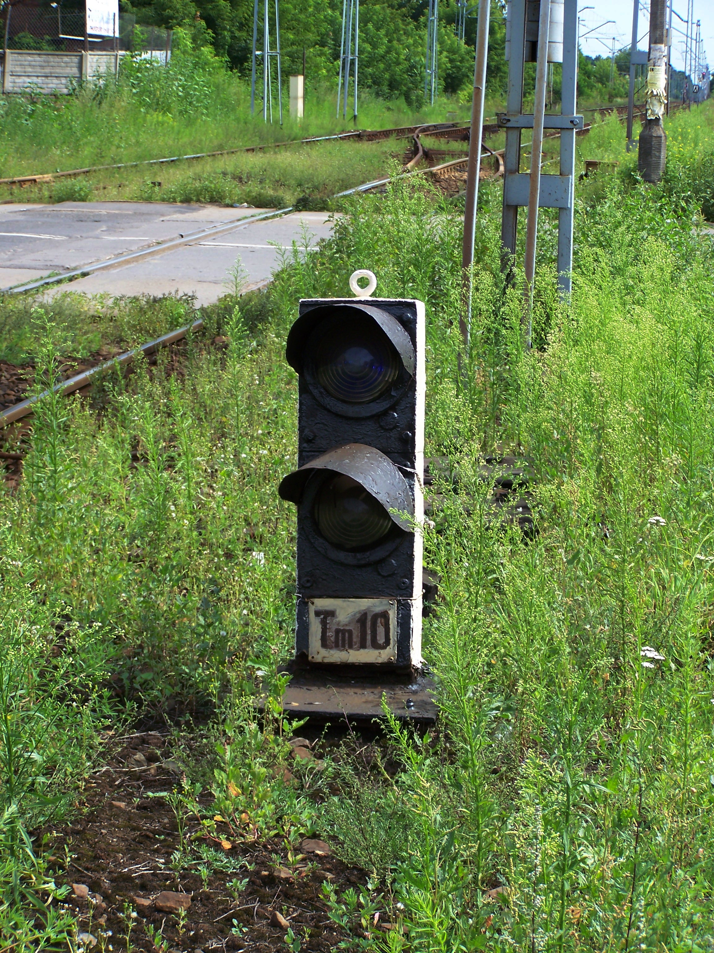 Tarcza manewrowa świetlna karzełkowa na stacji Warszawa Falenica.